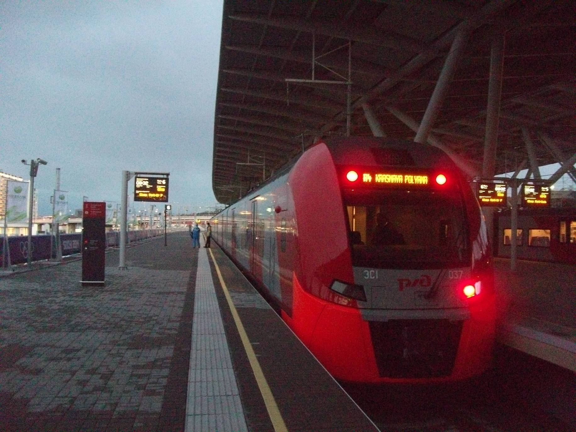 Электропоезд ЭС1-037 "Ласточка" на станции "Олимпийский Парк" во время зимних Олимпийских игр в Сочи